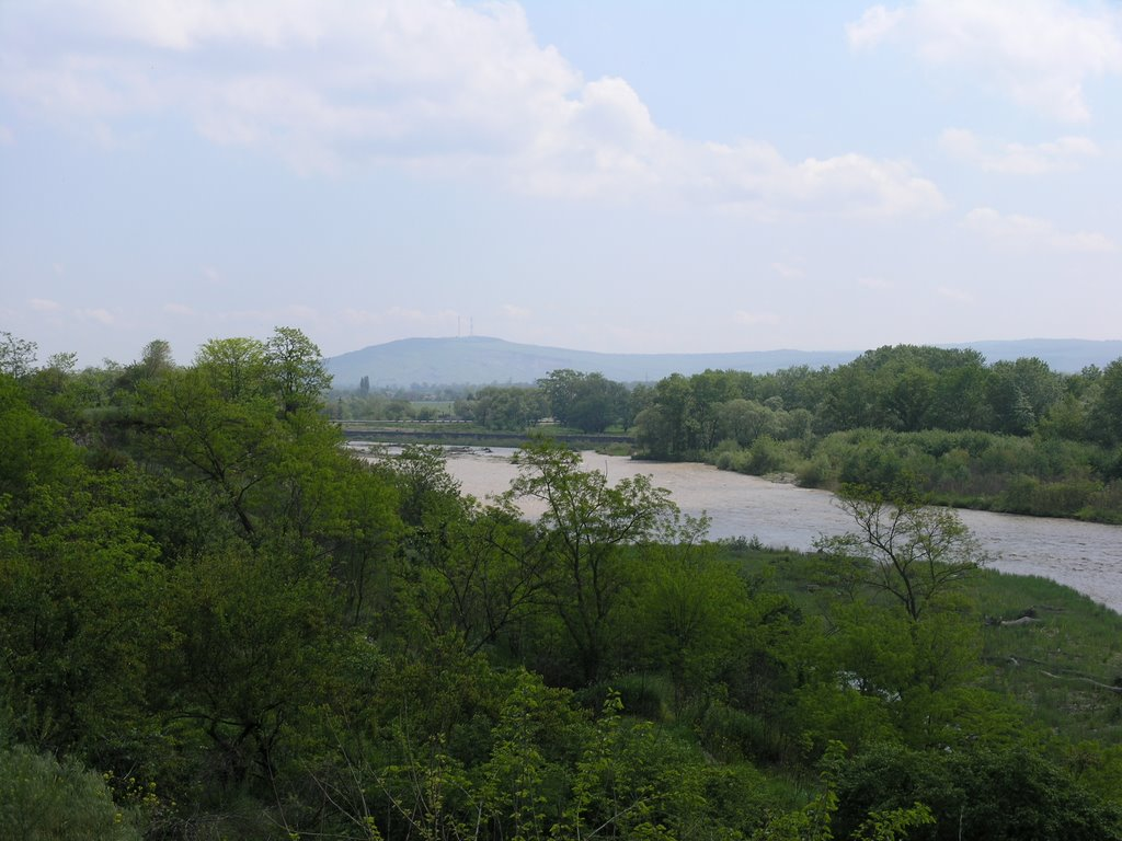 Вдоль этой реки, протянулось село Ивановское